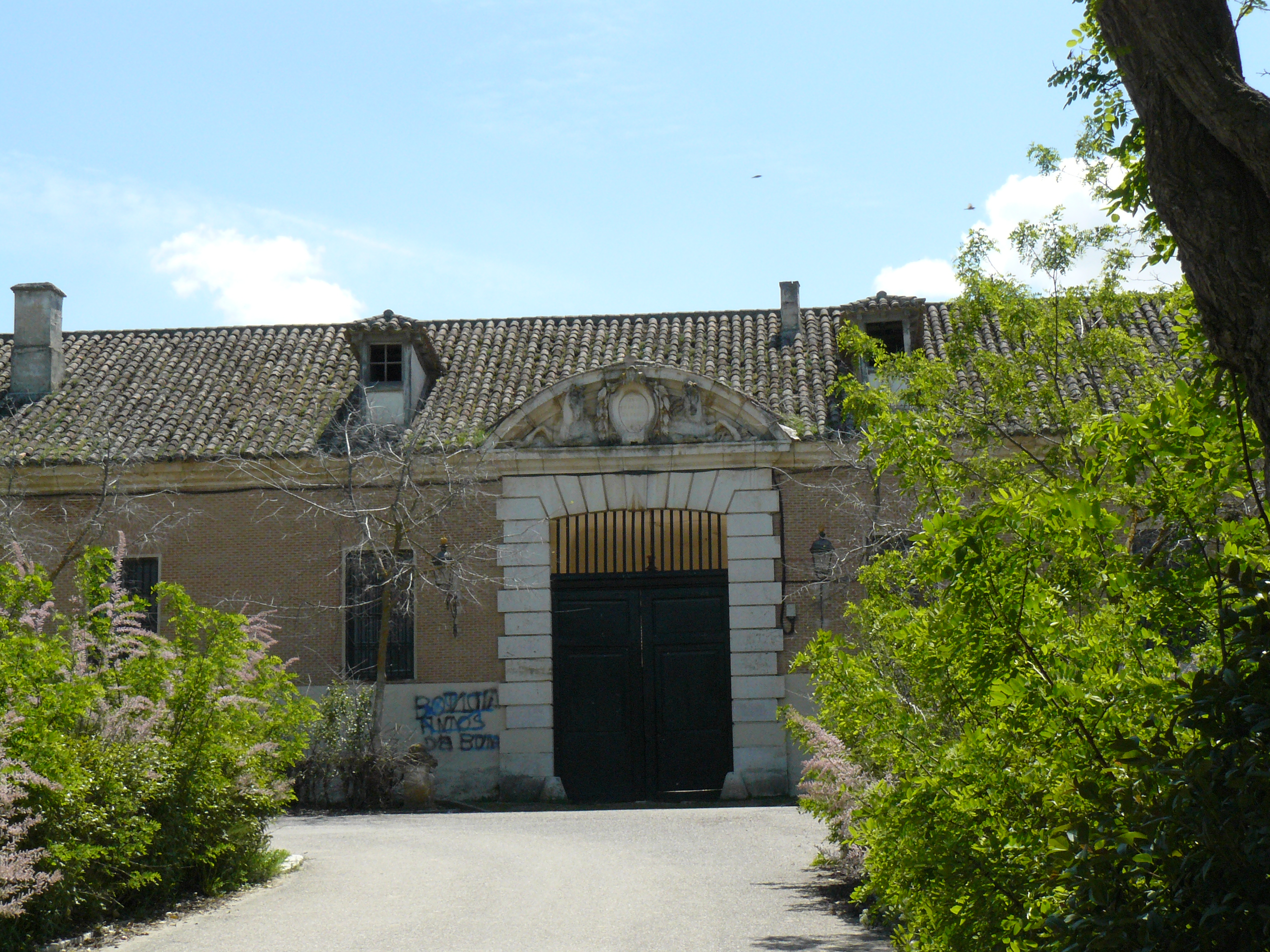 Casa de la Monta, caballerizas reales.